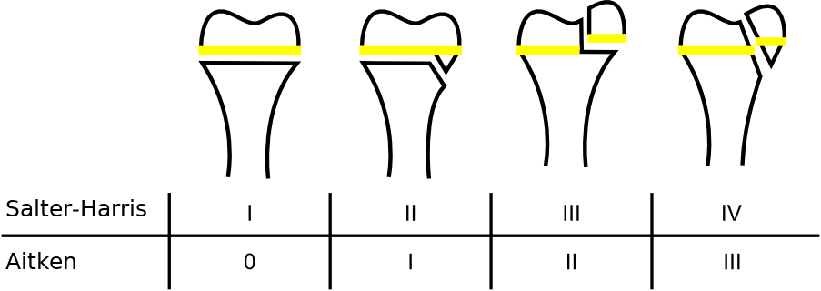 Einteilung der Epiphysenfugenfrakturen nach Salter-Harrys und nach Aitken